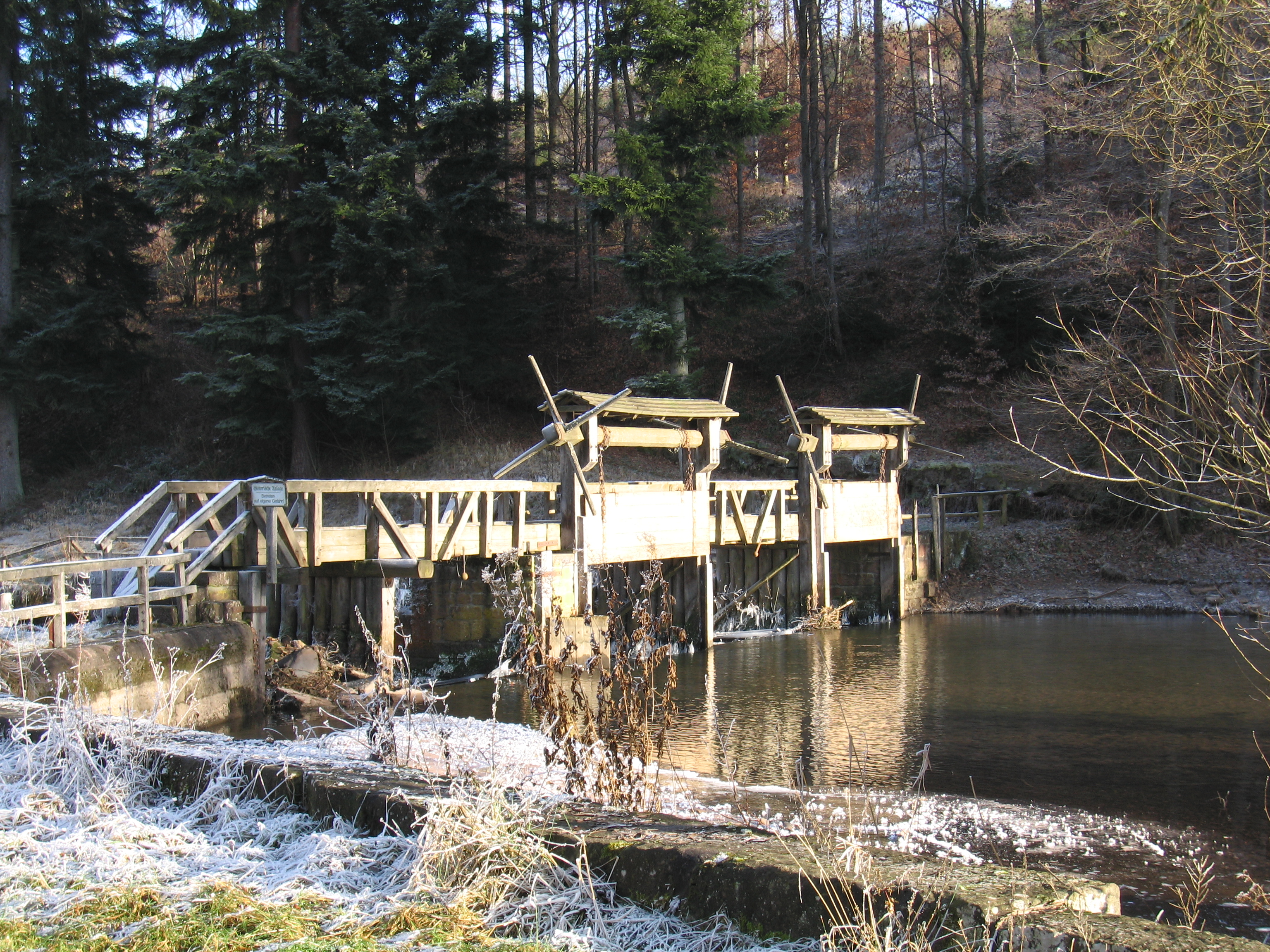 Monhardter Wasserstube, Altensteig, Baden-Württemberg, Germany